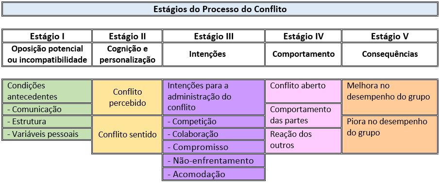 Tabela: Estágios do processo do conflito